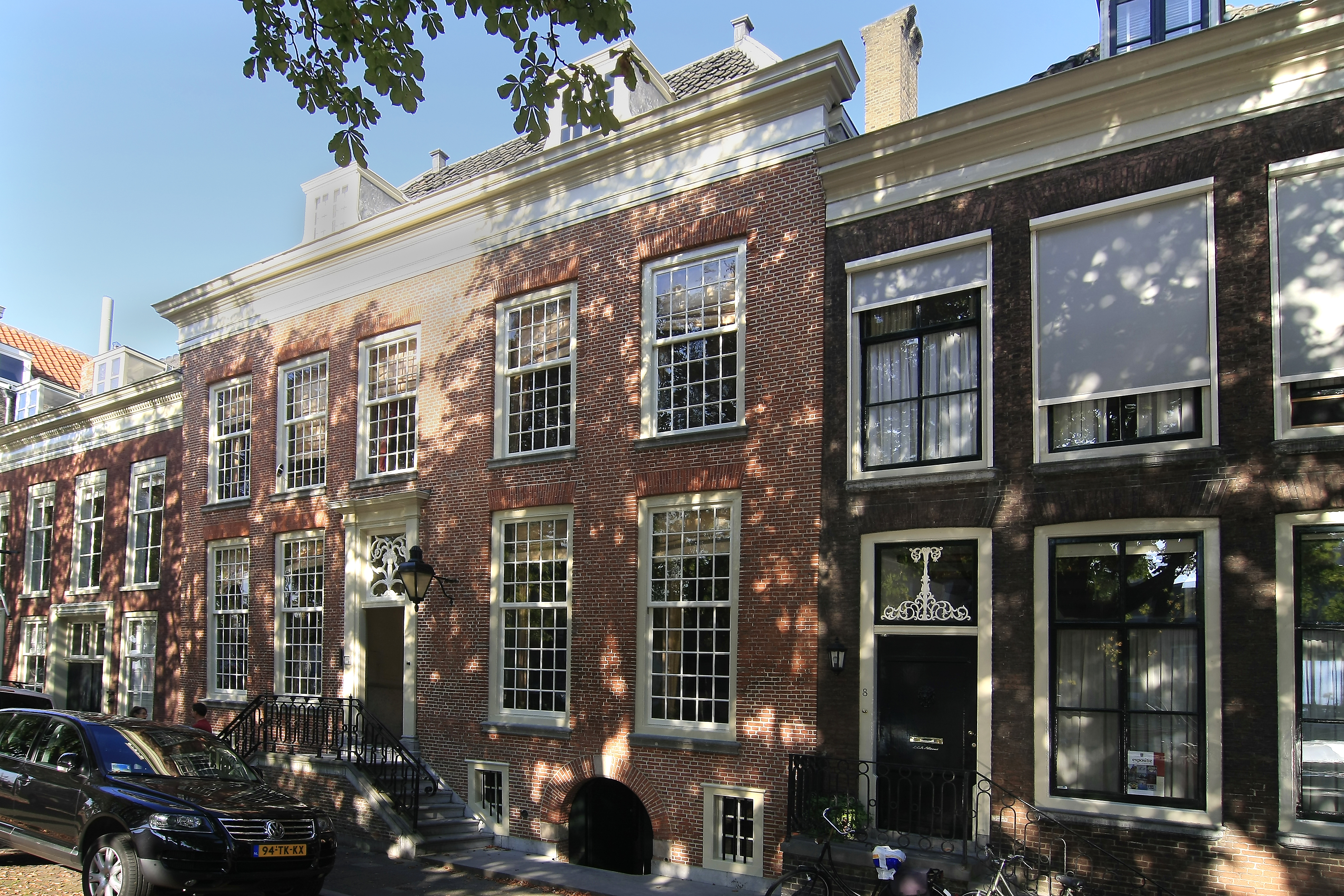 Historisch pand